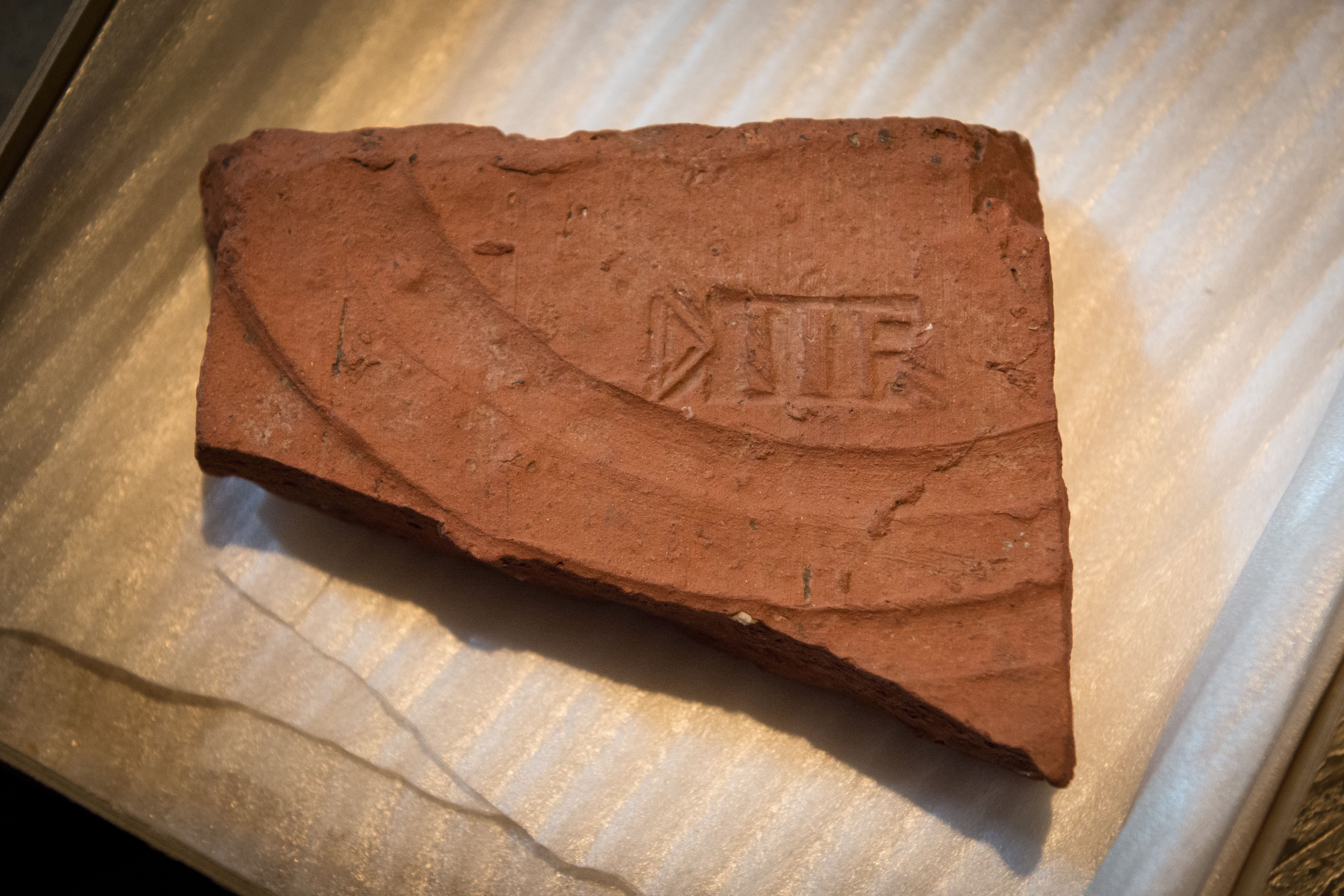 Römisches Reiterkastell Aquileia in Heidenheim an der Brenz, Dachziegelfragment (Tegula) mit Ziegelstempel der Ala II Flavia pia fidelis milliaria, ausgestellt im Museum im Römerbad. Fund von Eugen Gauss, 1905 in der Brenzstraße 37.